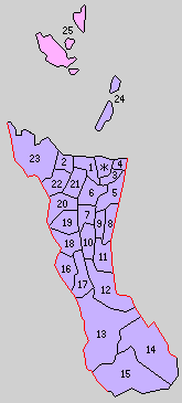 香川県香川郡の町村。